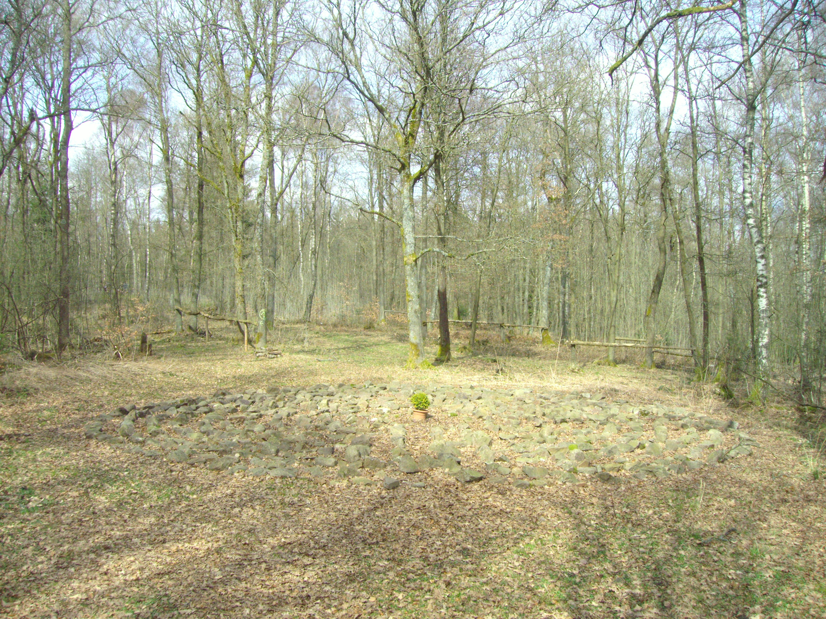 Labyrinth aus Steinen, entstanden 2005 anlässlich des Weltjugendtages in Köln, nahe der Pfarr- und Wallfahrtskirche Mariä Heimsuchung Kohlhagen